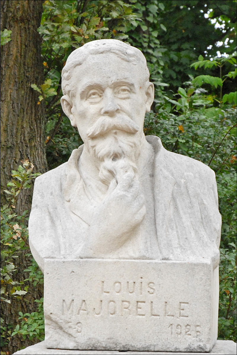 Buste de Louis Majorelle dans le jardin du musée de l'Ecole de Nancy